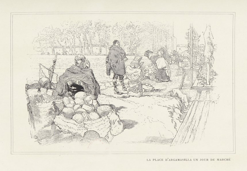 La place d'Argamasilla un jour de marché.